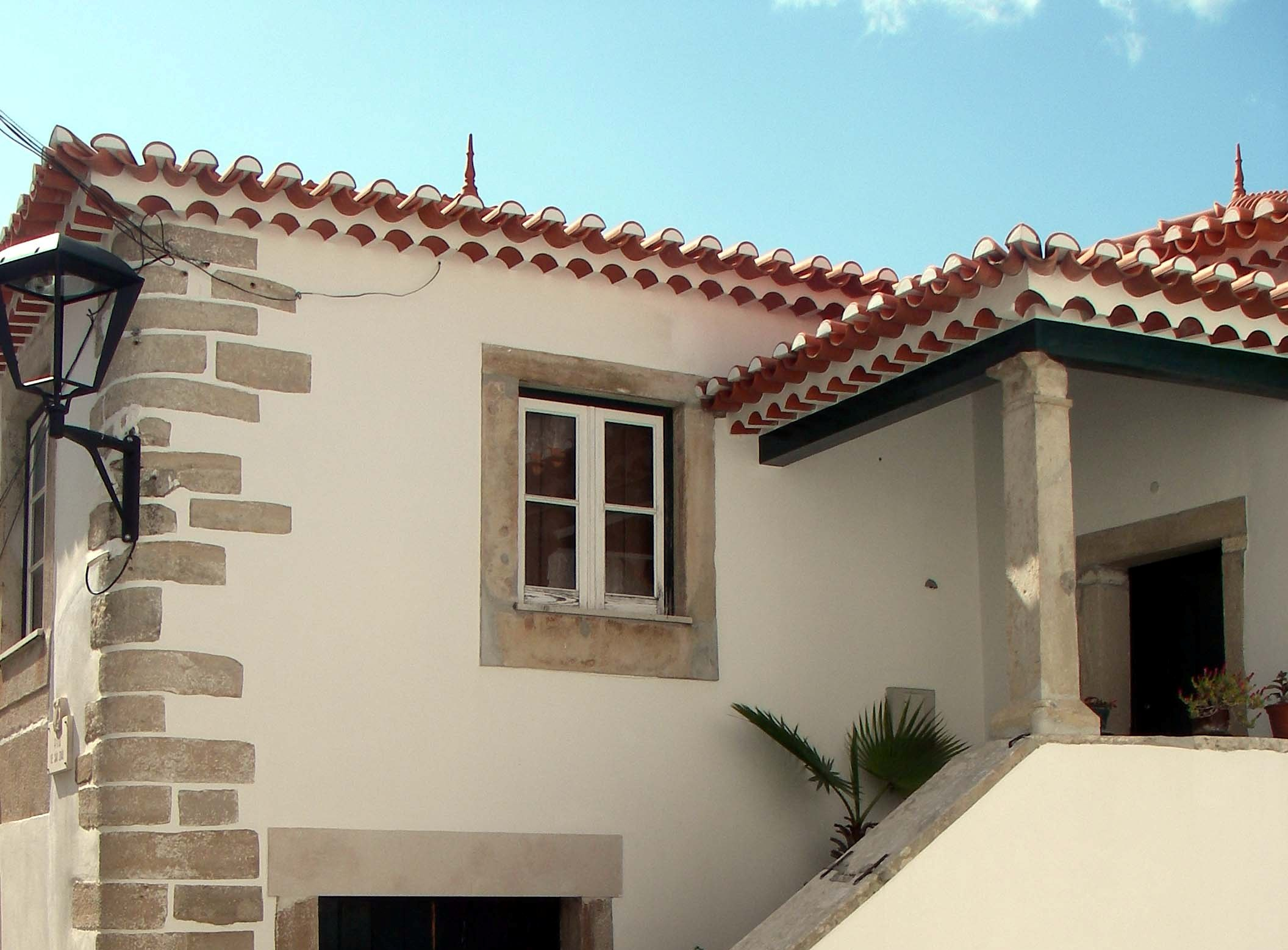 Castelo de Ourém This file was uploaded for Wiki Loves Monuments in Portugal with the unique identifier 69874.